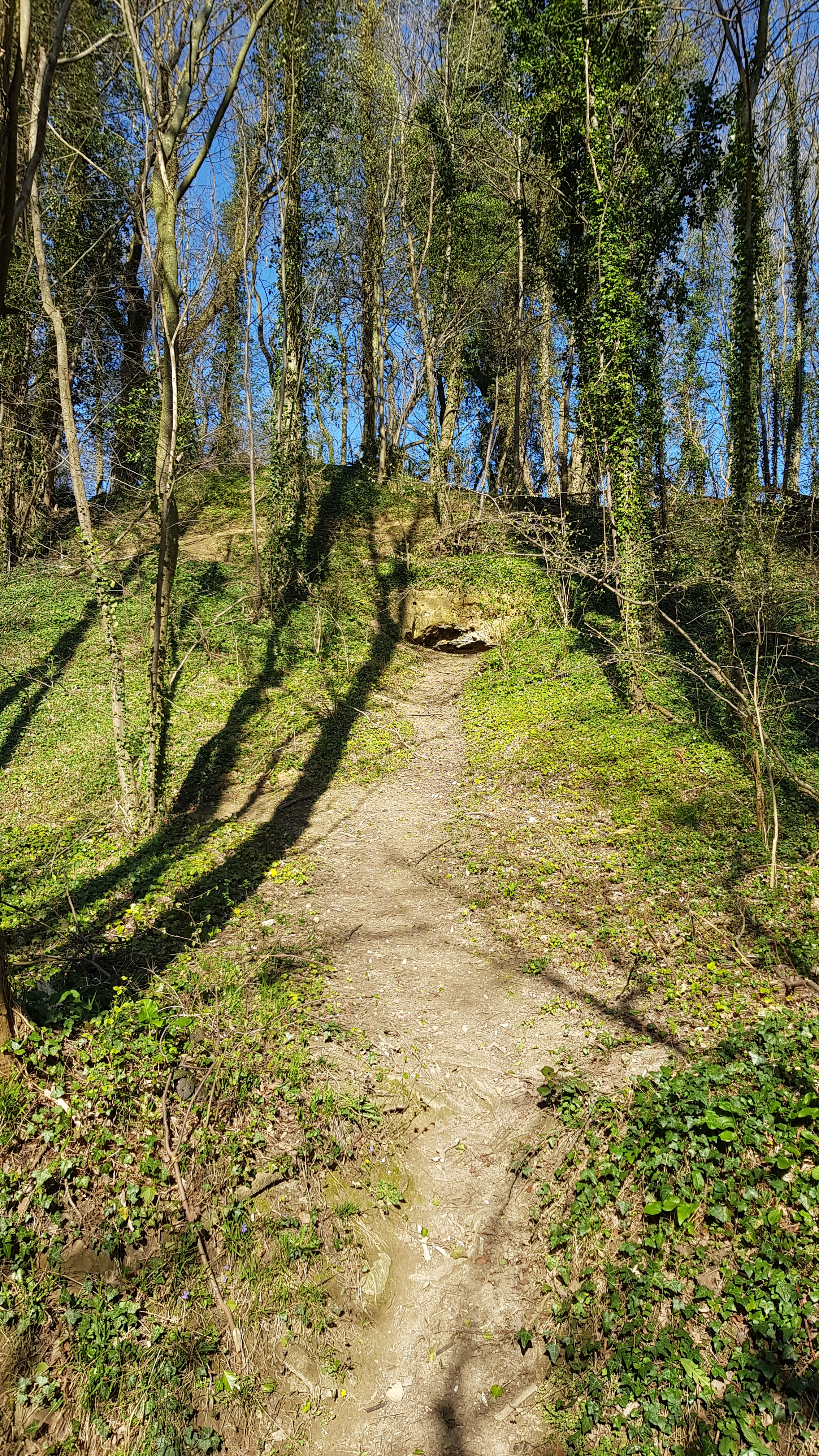 Heiberggroeve, Valkenburg, Nederland